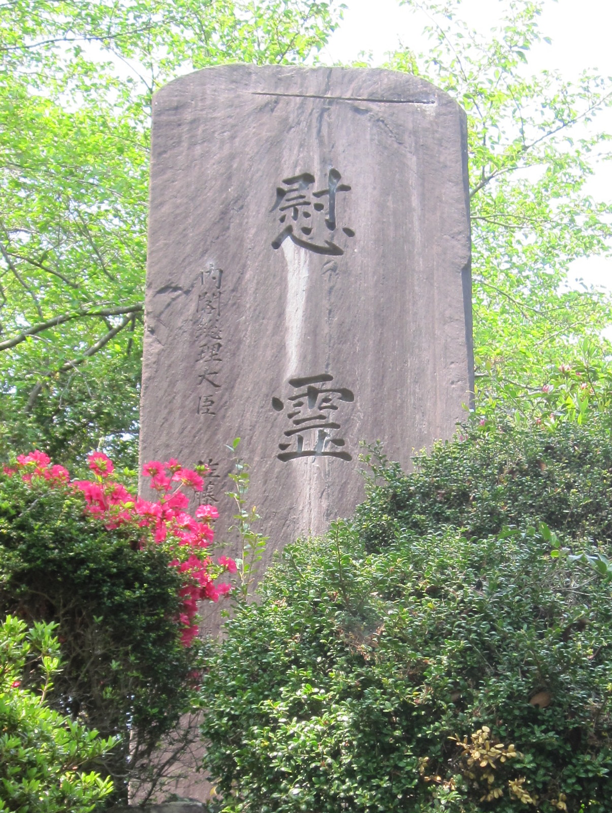 保存用資料として撮影